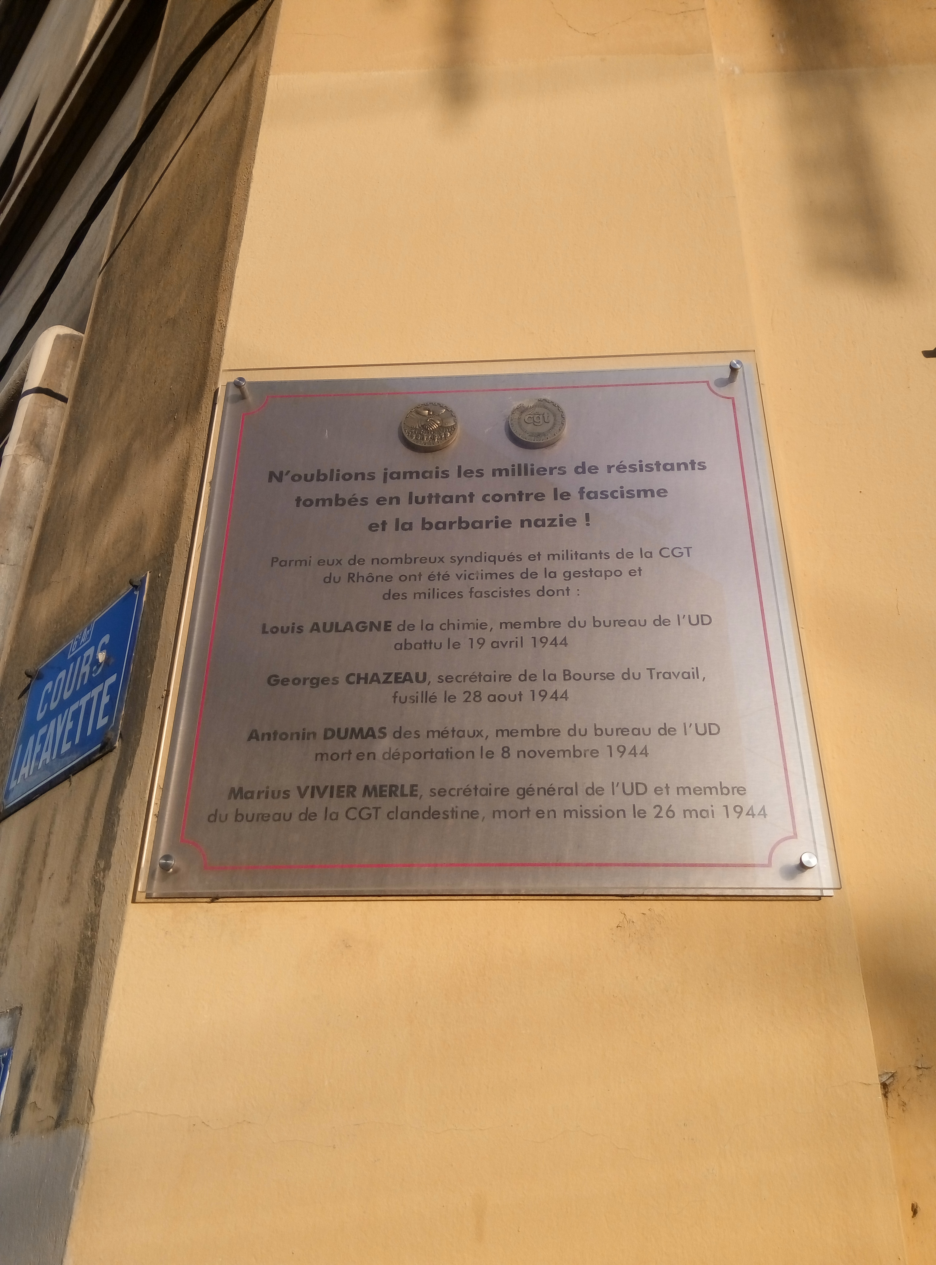 Plaque en hommage aux militants-résistants CGT tués en 1944.